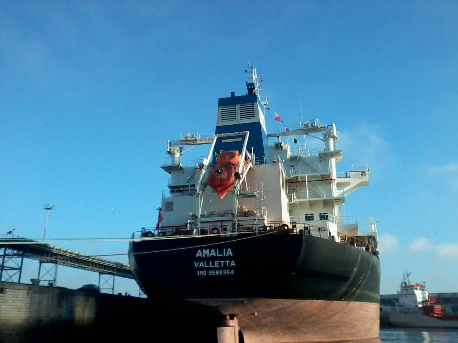 Poupe du navire AMALIA en quai à Casablanca . Casablanca - Morocco - IMO: 9588354 MMSI: 215228000 Indicatif d’Appel: 9HA2677 Pavillon: Malta Genre du navire: Cargo Jauge brute: 22223 Port en lourd: 34023 t Longueur Hors Tout x Largeur Hors Tout: 180m × 29.99m Année de Construction: 2011